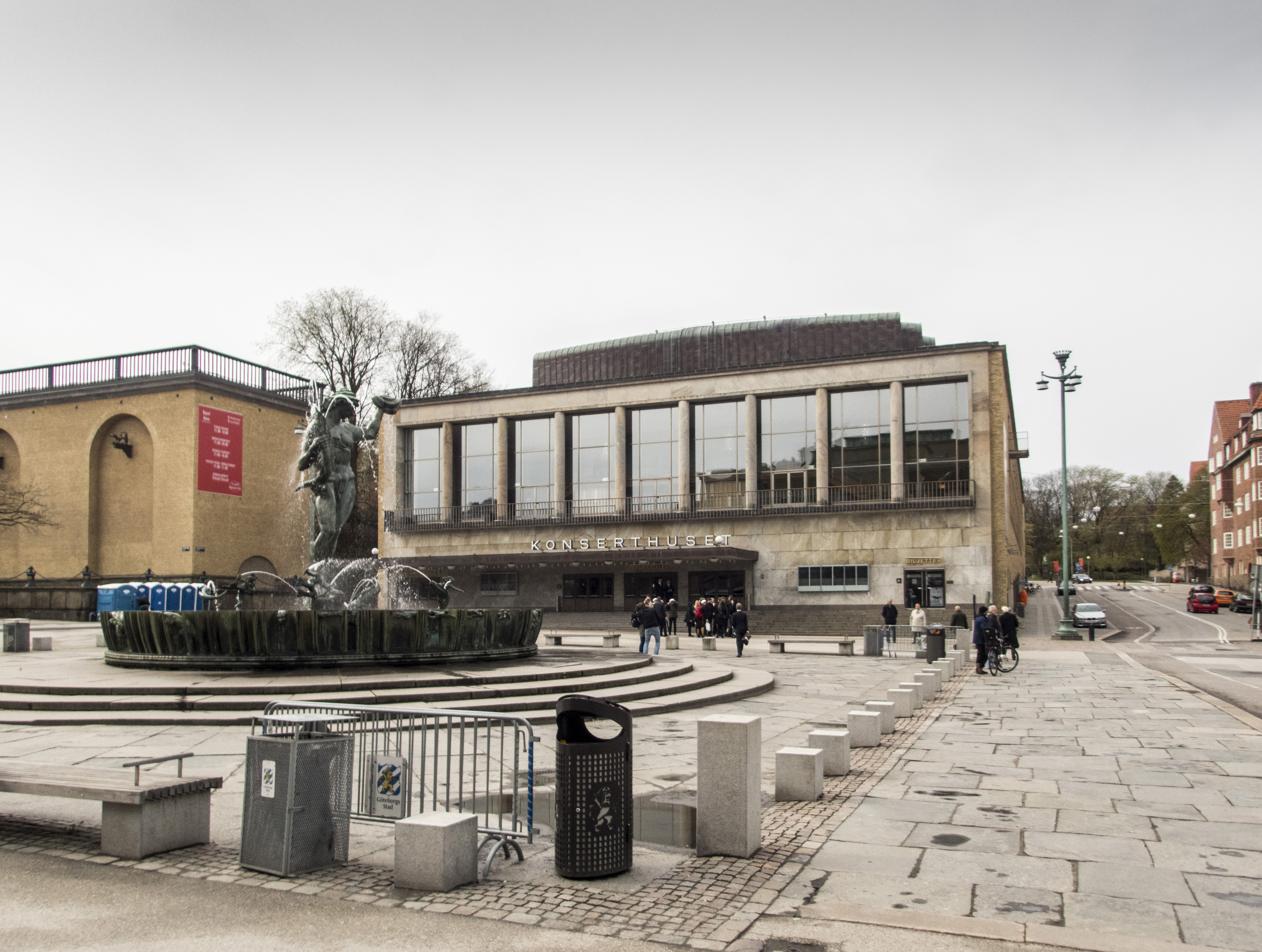 Göteborgs konserthus. Invigt 1935. Arkitekt: Nils Einar Eriksson